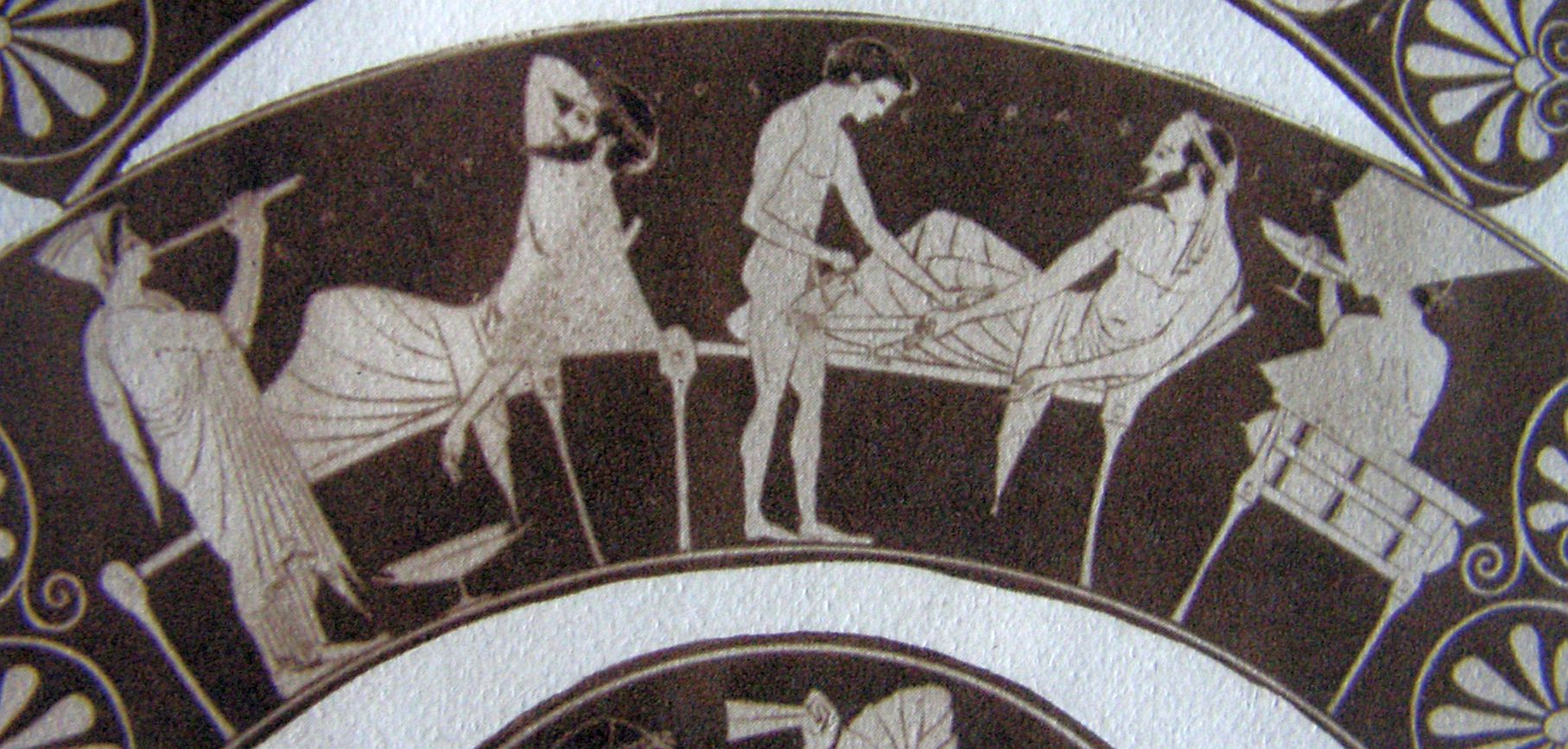 Ancient Greek furniture example